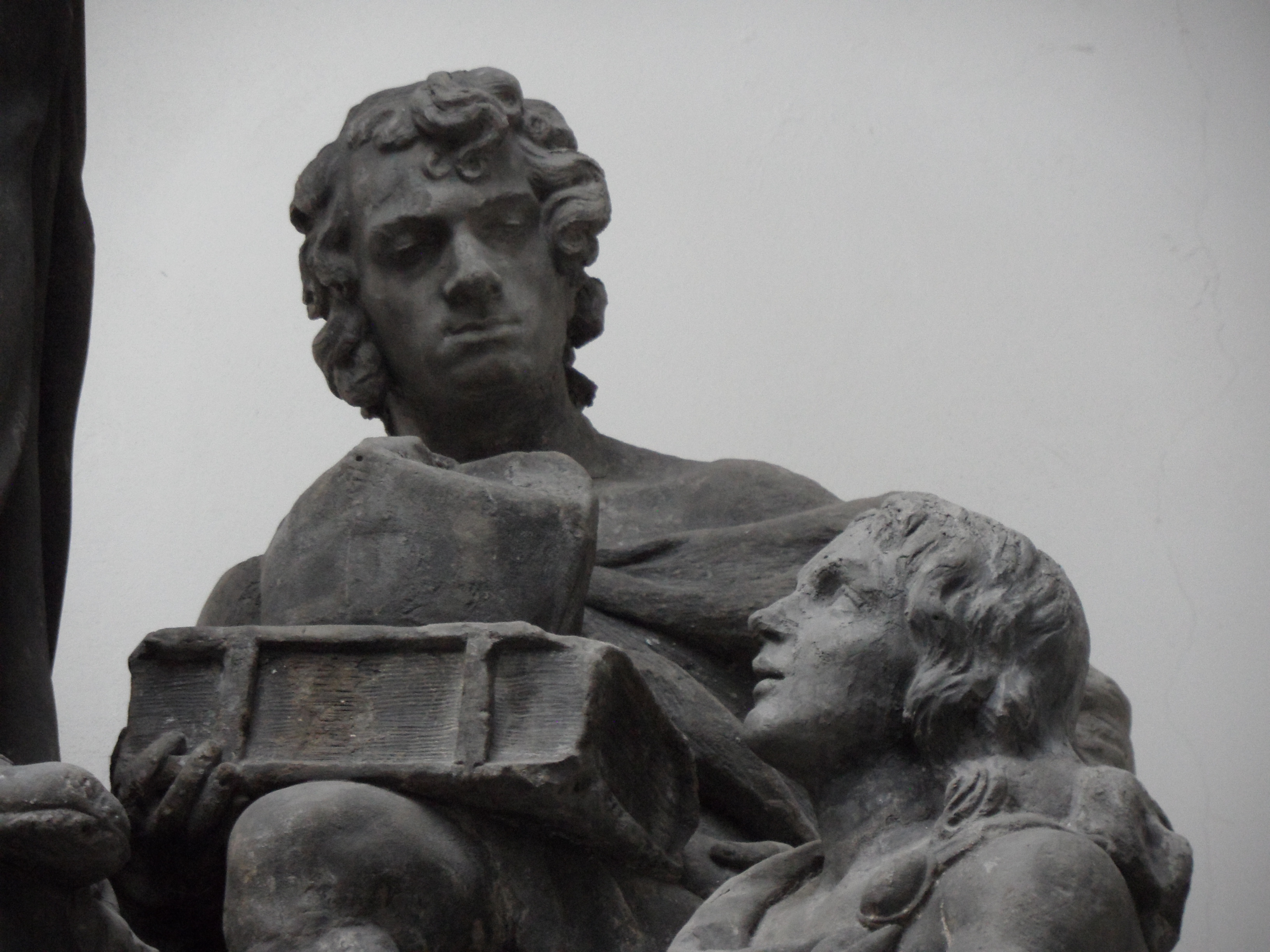 Sousoší sv. Františka Xaverského z Karlova mostu, Lapidárium NM, Praha - Ferdinand Maxmilián Brokoff, detail domnělého sochařova autoportrétu